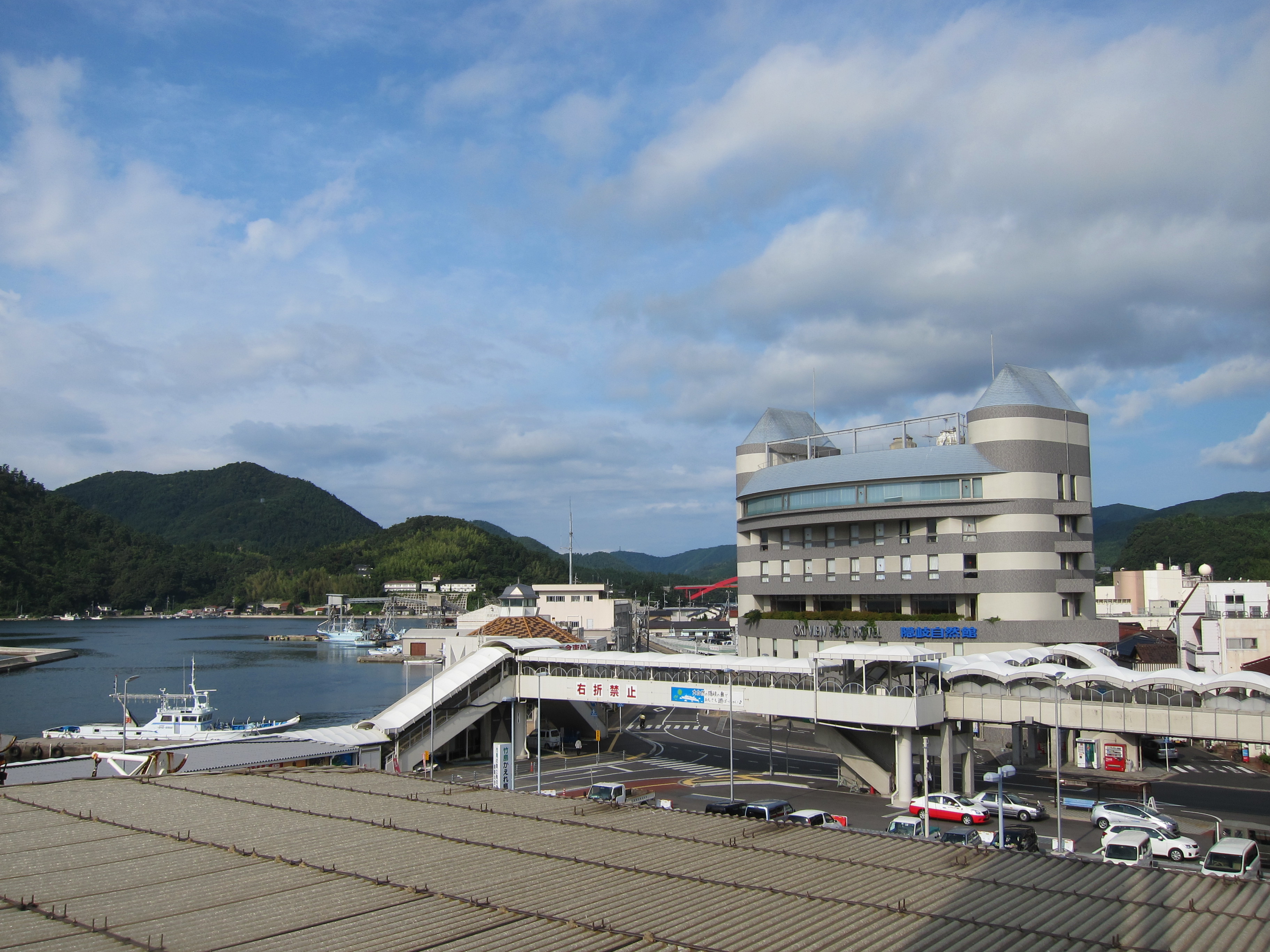 隠岐ビューポートホテルと西郷港